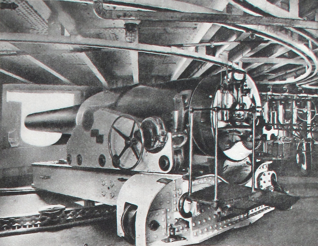 24cm gun model 1884